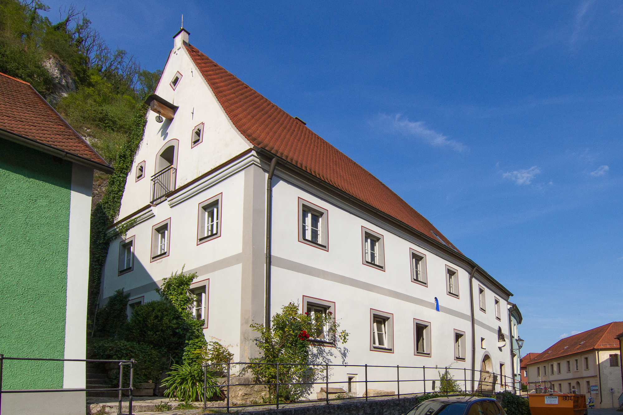 Wohnhaus, sog. Bertholzhofener Schlösschen; zweigeschossiger und traufständiger Satteldachbau mit geknickter Fassade, 17./18. JahrhundertThis is a photograph of an architectural monument.